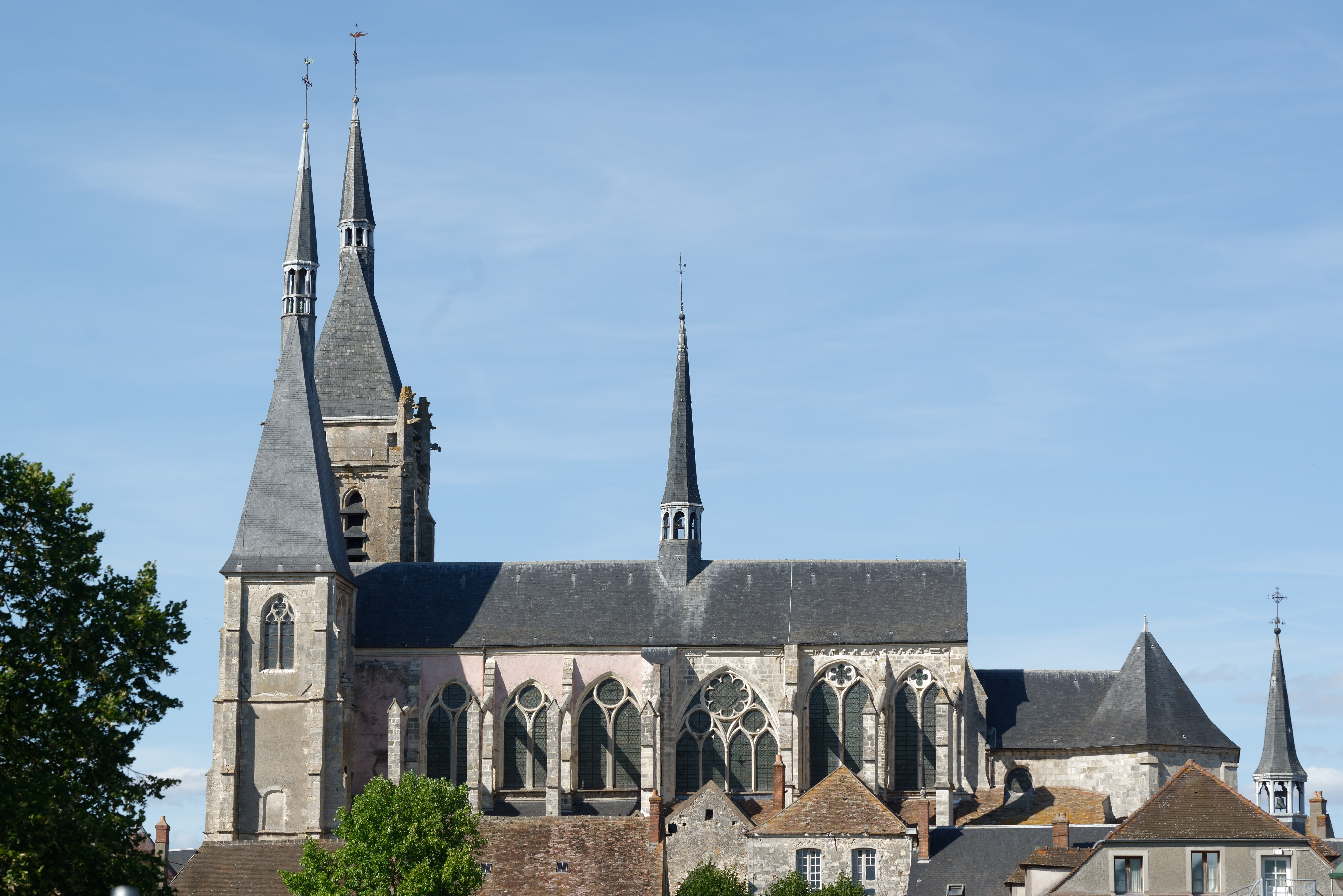 L'église Saint-Germain-d'Auxerre de Dourdan vue depuis l'esplanade du Québec.